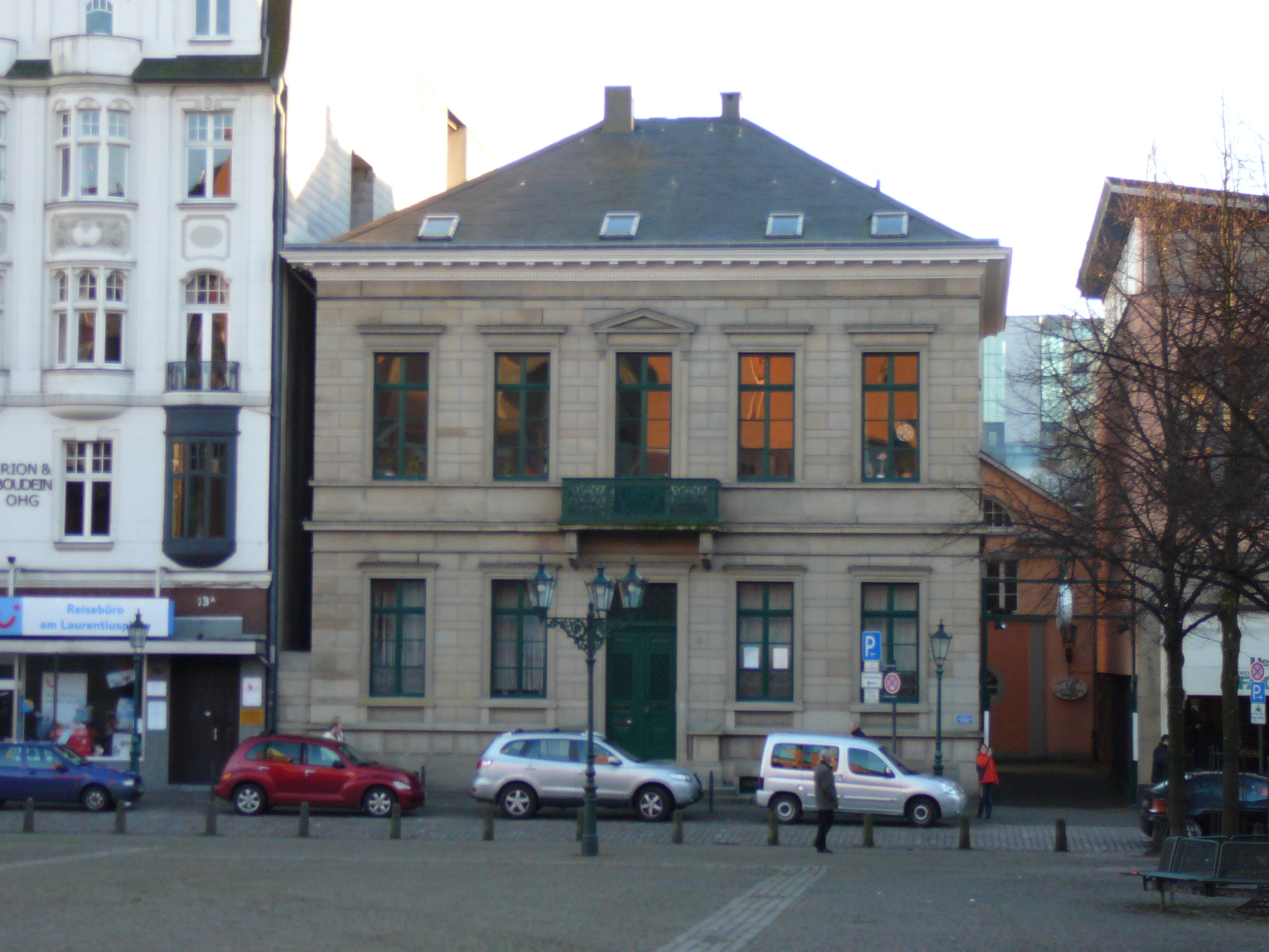 Villa in der Friedrich-Ebert-Str, Wuppertal